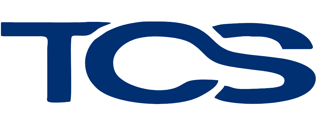 Representación del logotipo de la televisora TCS en El Salvador.